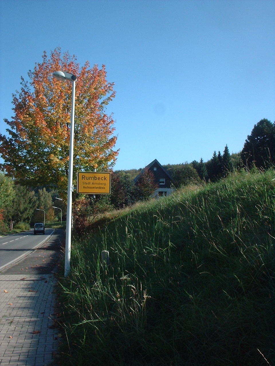 Rumbeck